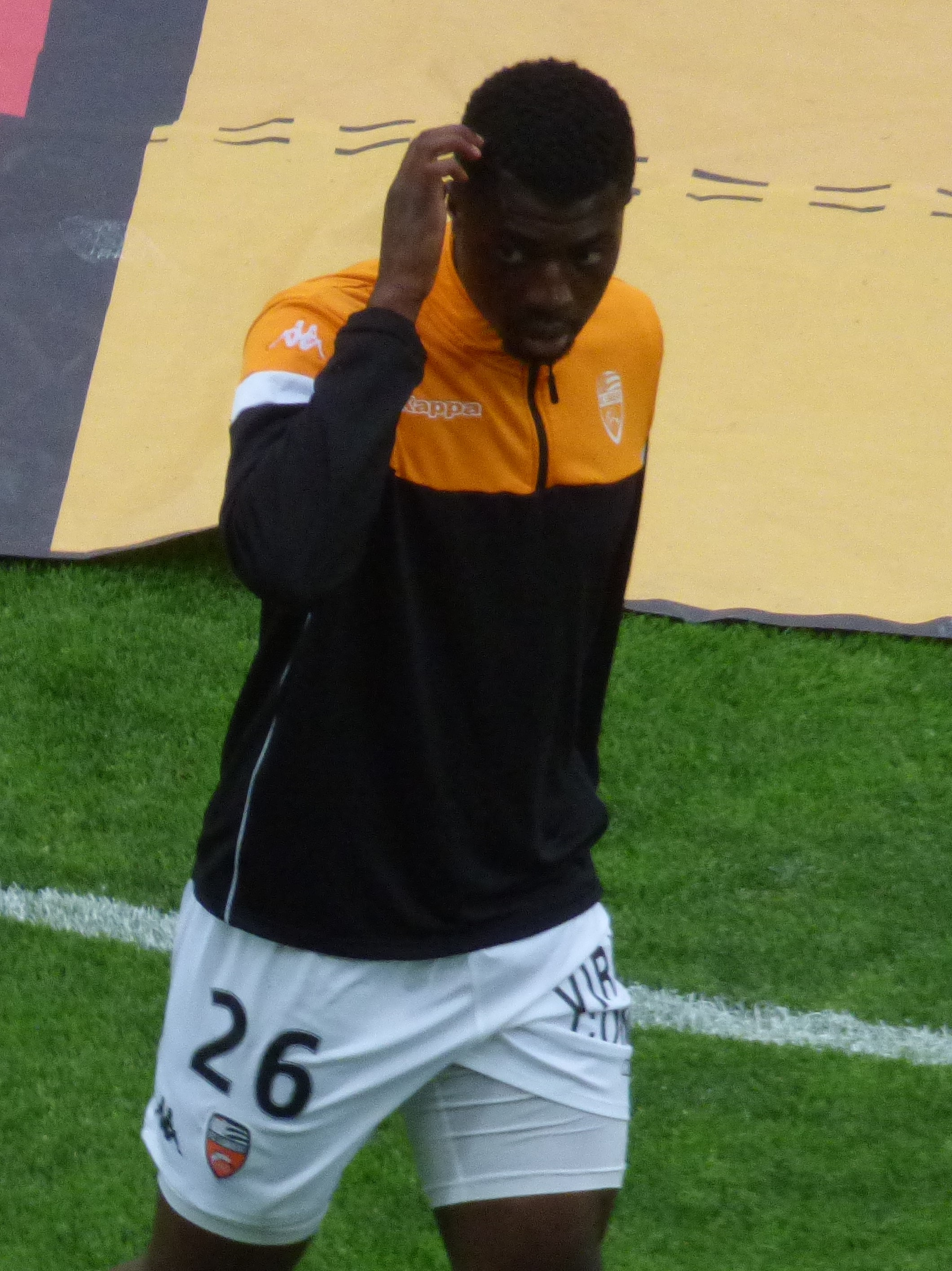 Ibrahim Sissoko avant le match RC Lens / FC Lorient, comptant pour la 34ème journée du championnat de France de Ligue 2 de football 2018-2019, le 23 avril 2019, au Stade Bollaert-Delelis.